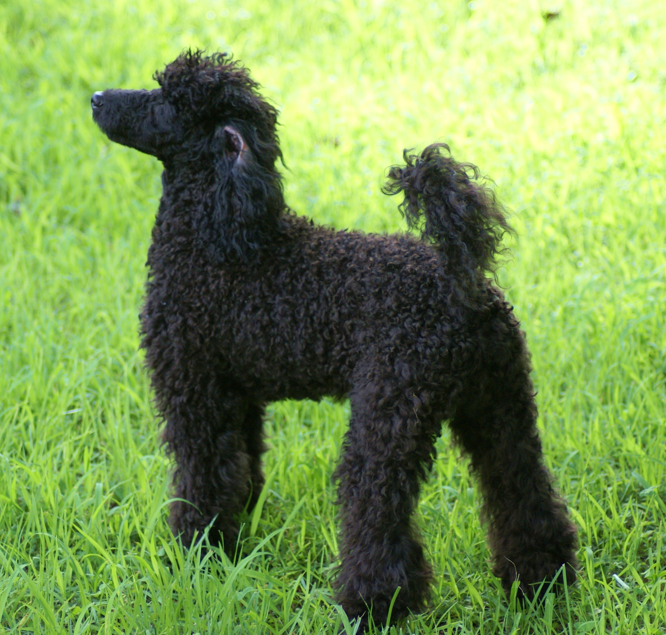 A male Miniature Poodle.